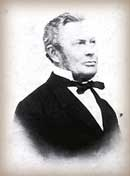 Karl von Bloedau (1804-1886), Fürstlich Schwarzburg-Sondershausener Geheimrat und Leibarzt